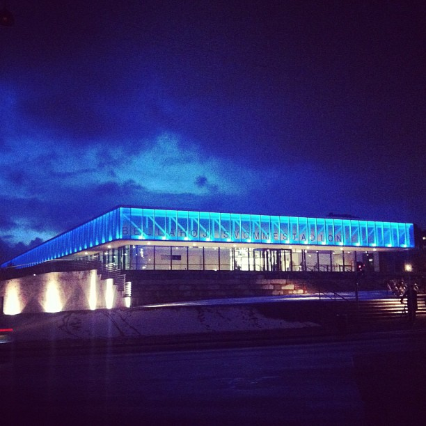 Bellahøj Svømmehal in Copenhagen, Denmark